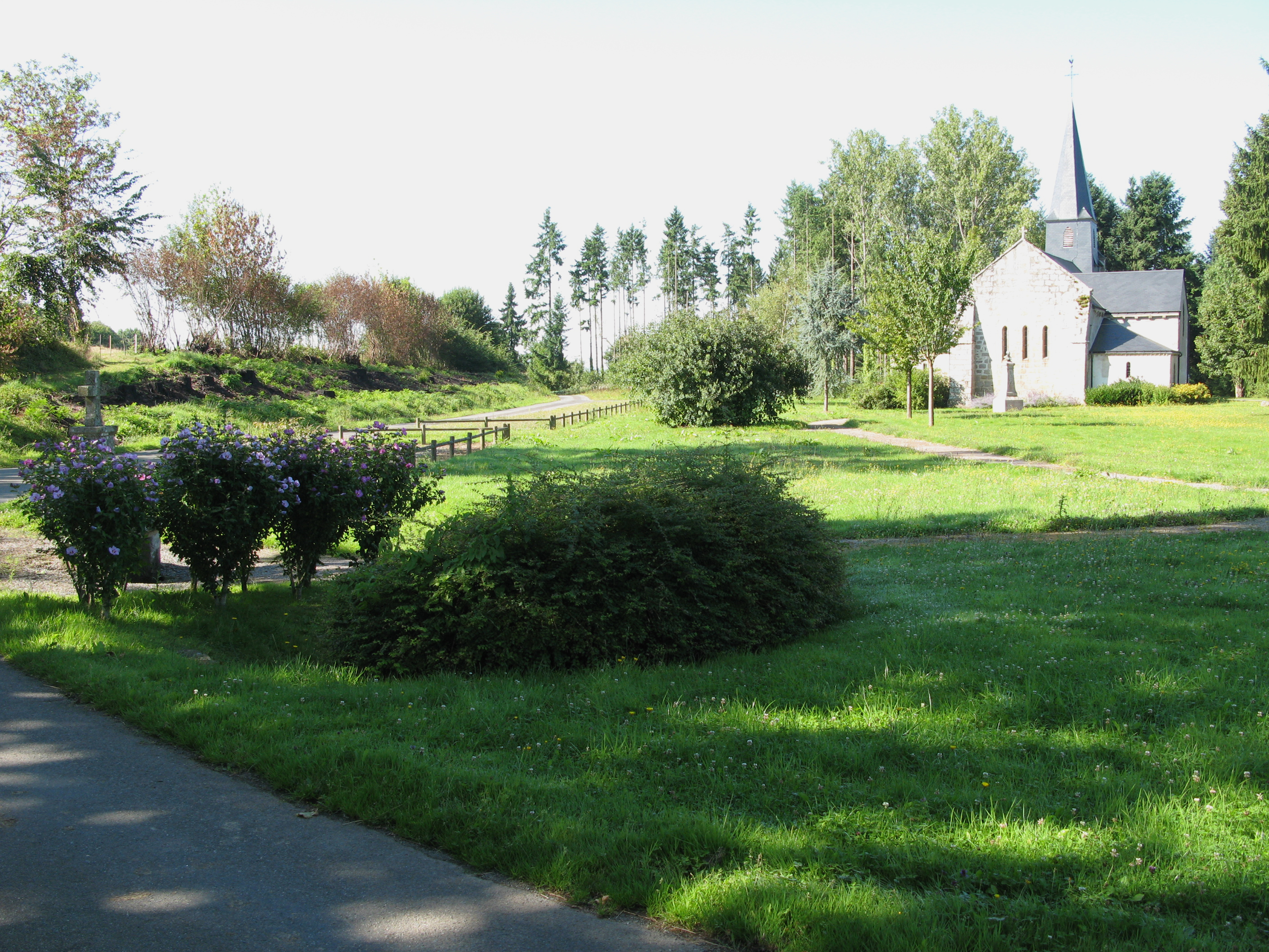 La Forêt-du-Temple (Creuse, France) - L'église est au-delà du cimetière, à l'écart du village. . .